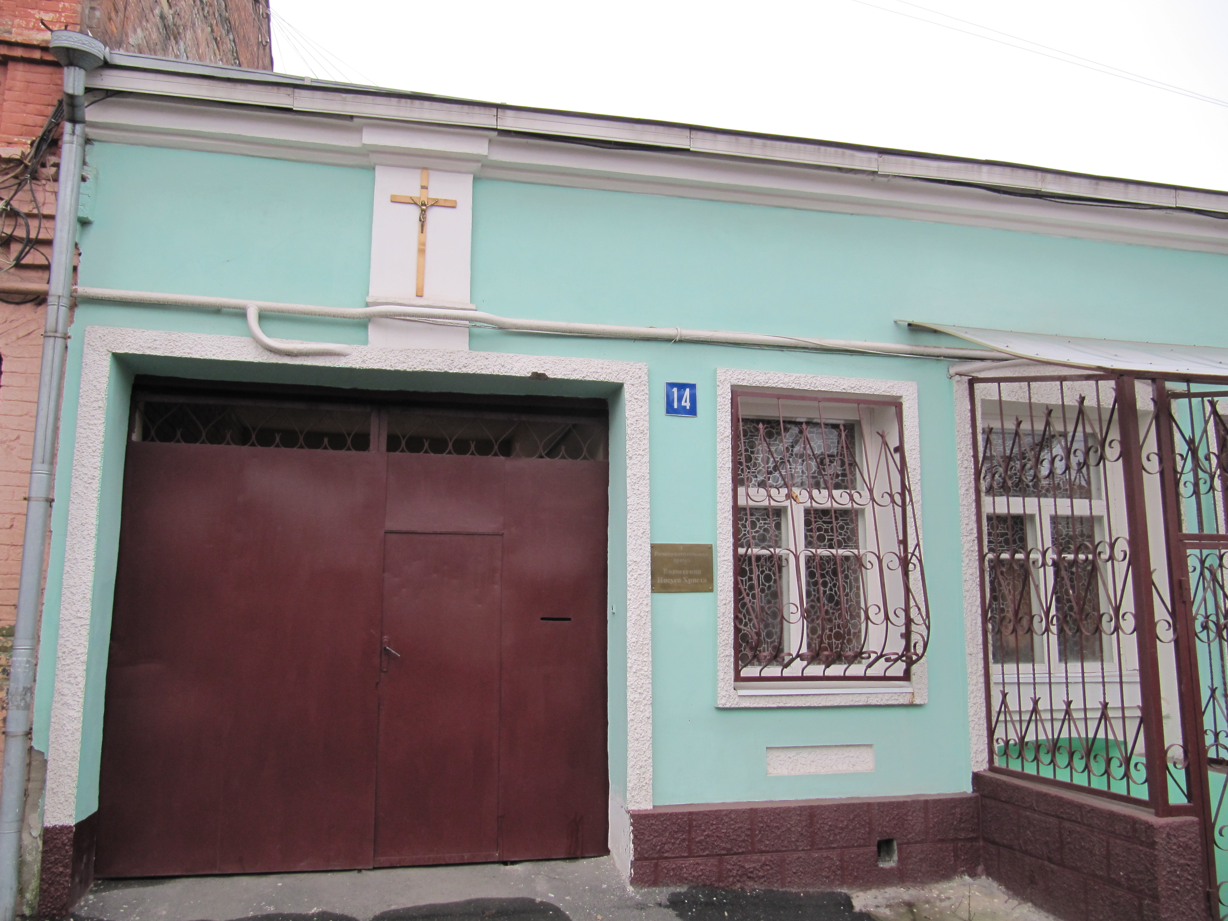 Католический приход Вознесения Христова во Владикавказе